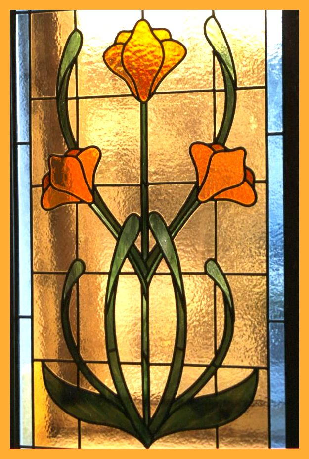 Carlo Roccella